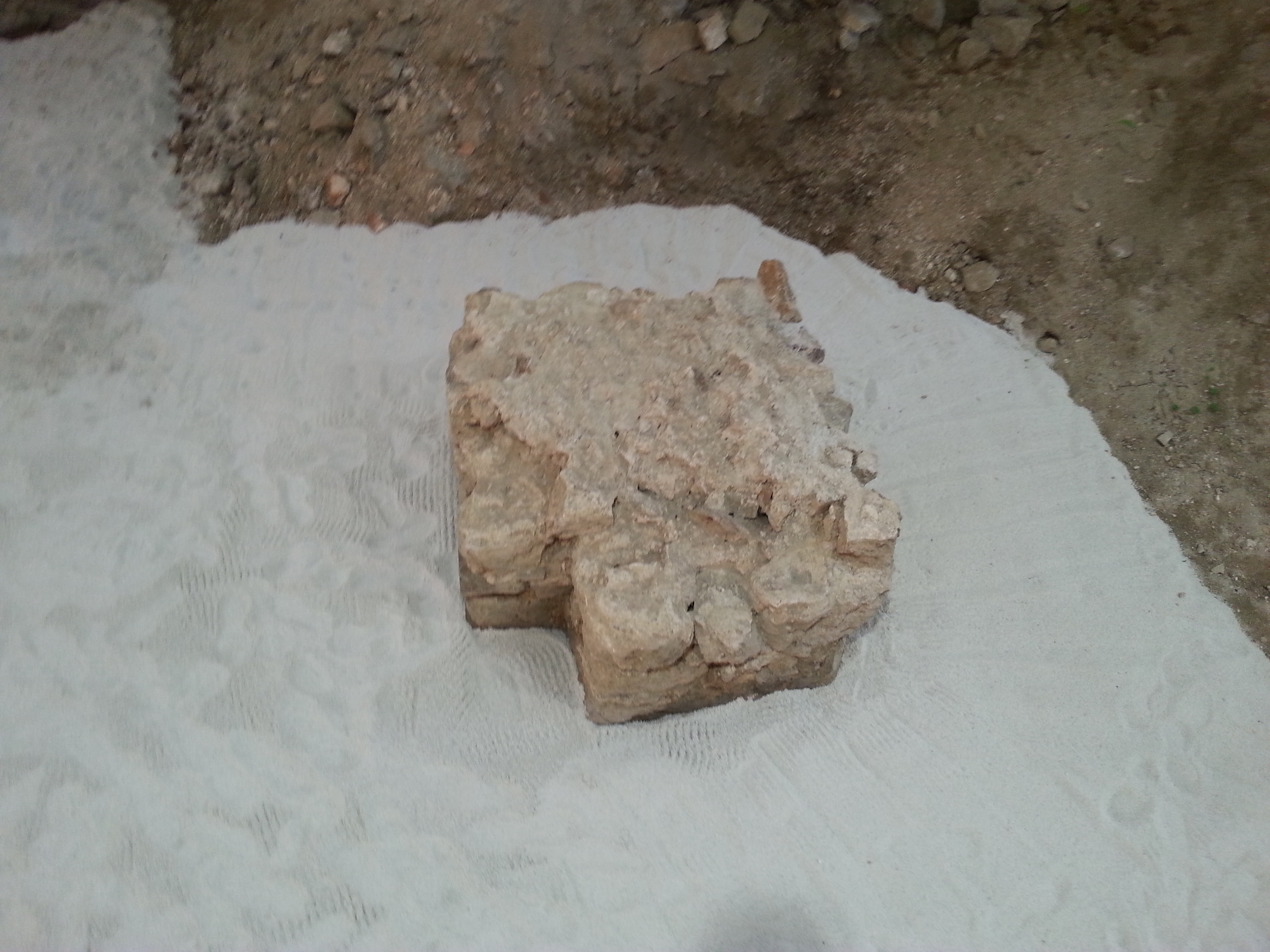 Pfeilerfundament am Innenhof des spätrömischen Burgus von Oberranna, Österreich.